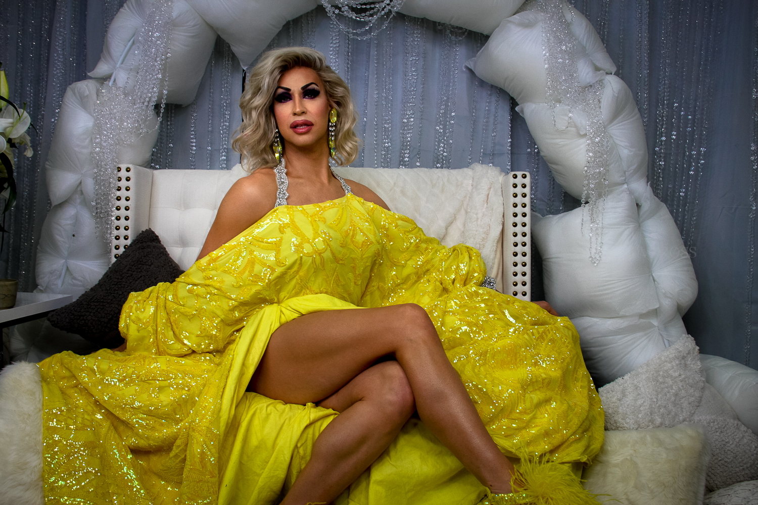 Rupaul's DragCon 2019